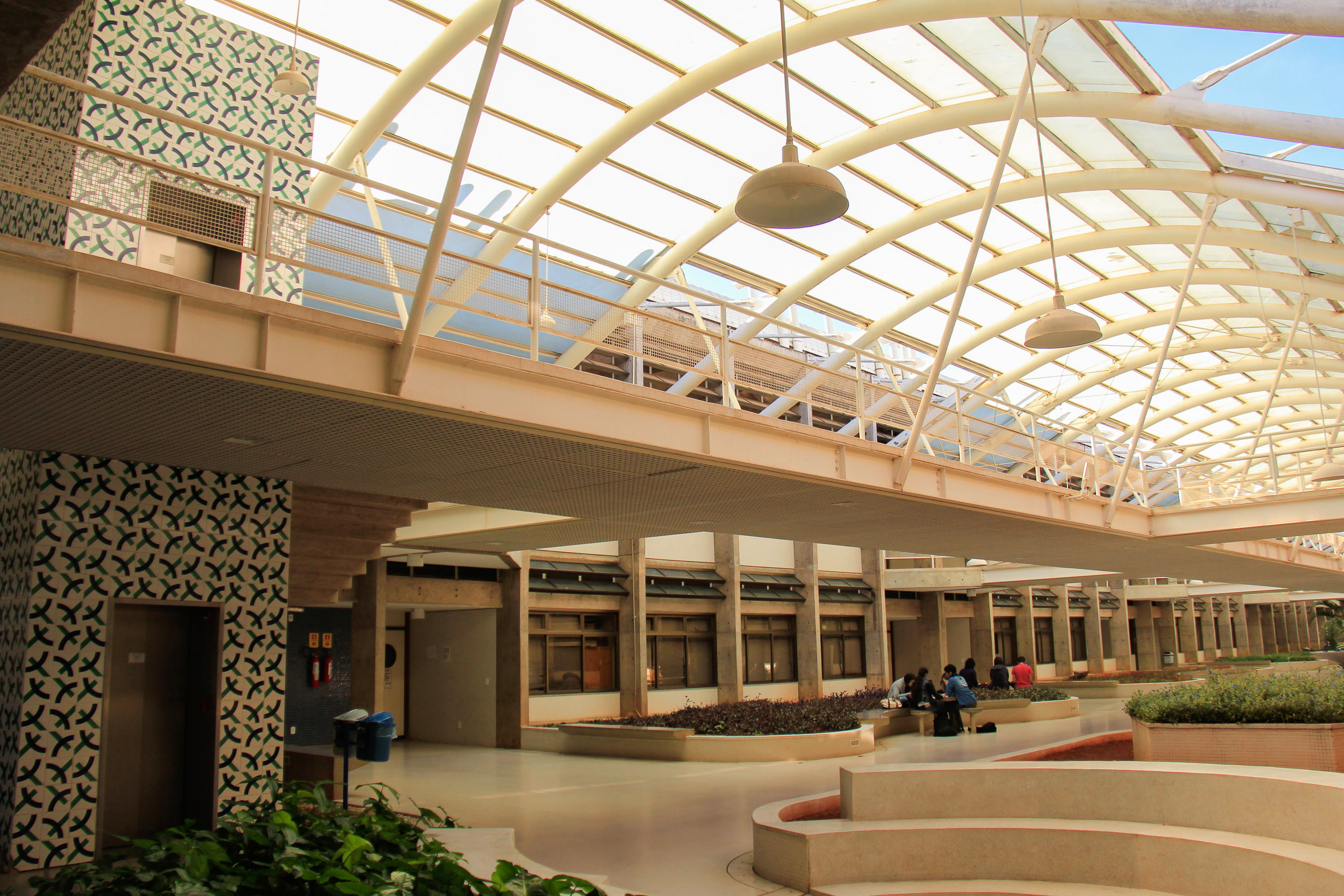 Foto:Julio Minais/Secom UnB